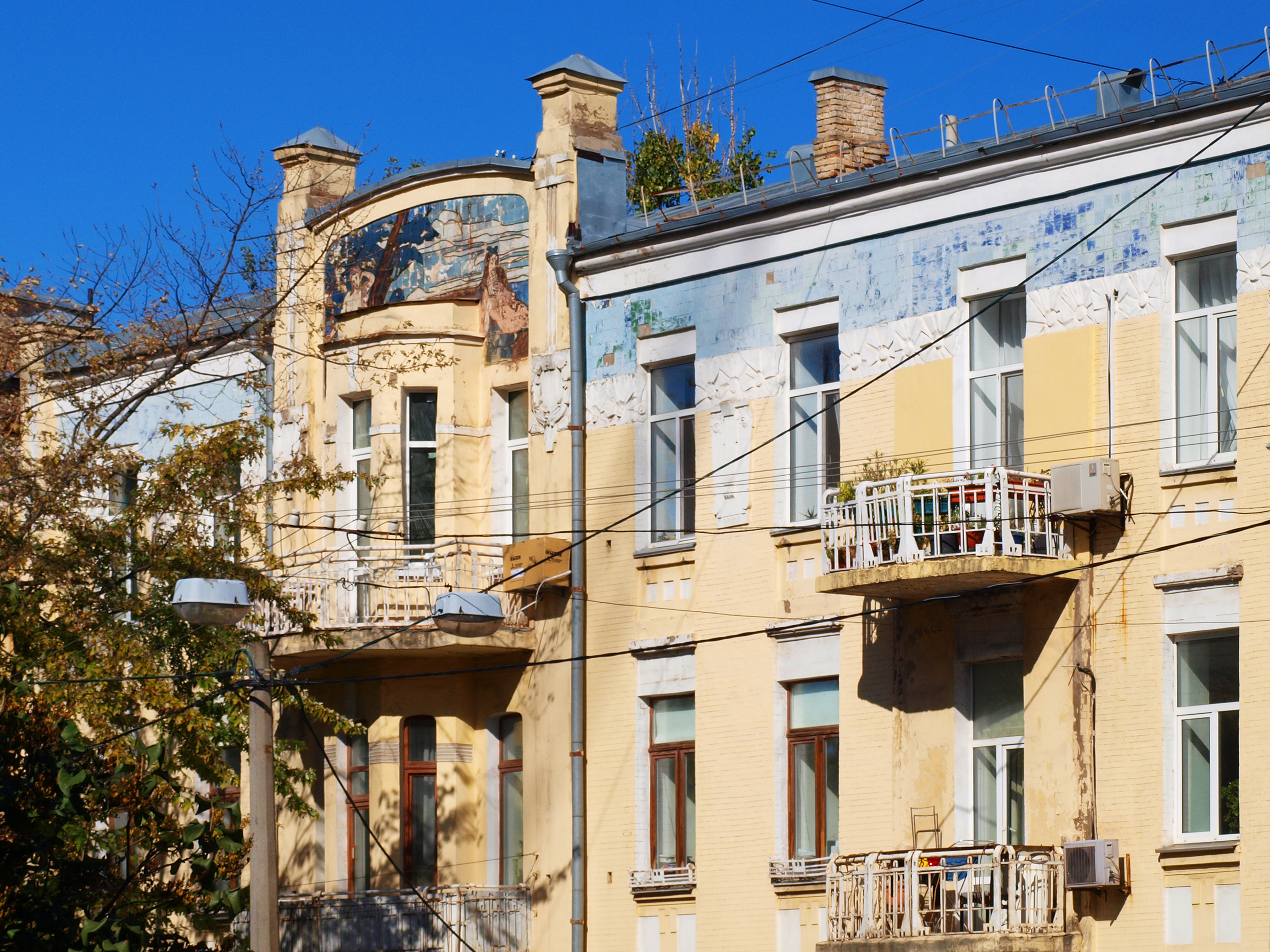 Будинок із Паном і німфами, в якому мешкали до 1917 року — О. М. Вербицький, архітектор; у 1930-х роках — Ю. М. Міхновський, церковний діяч, Київ, Лютеранська вул., 15